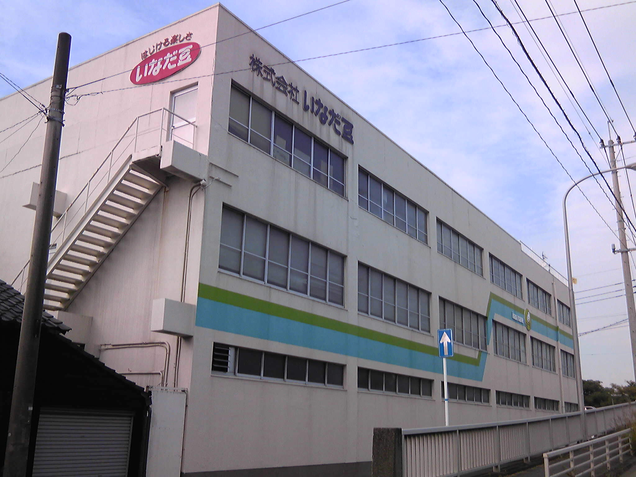 いなだ豆本社・工場（福岡県大牟田市）